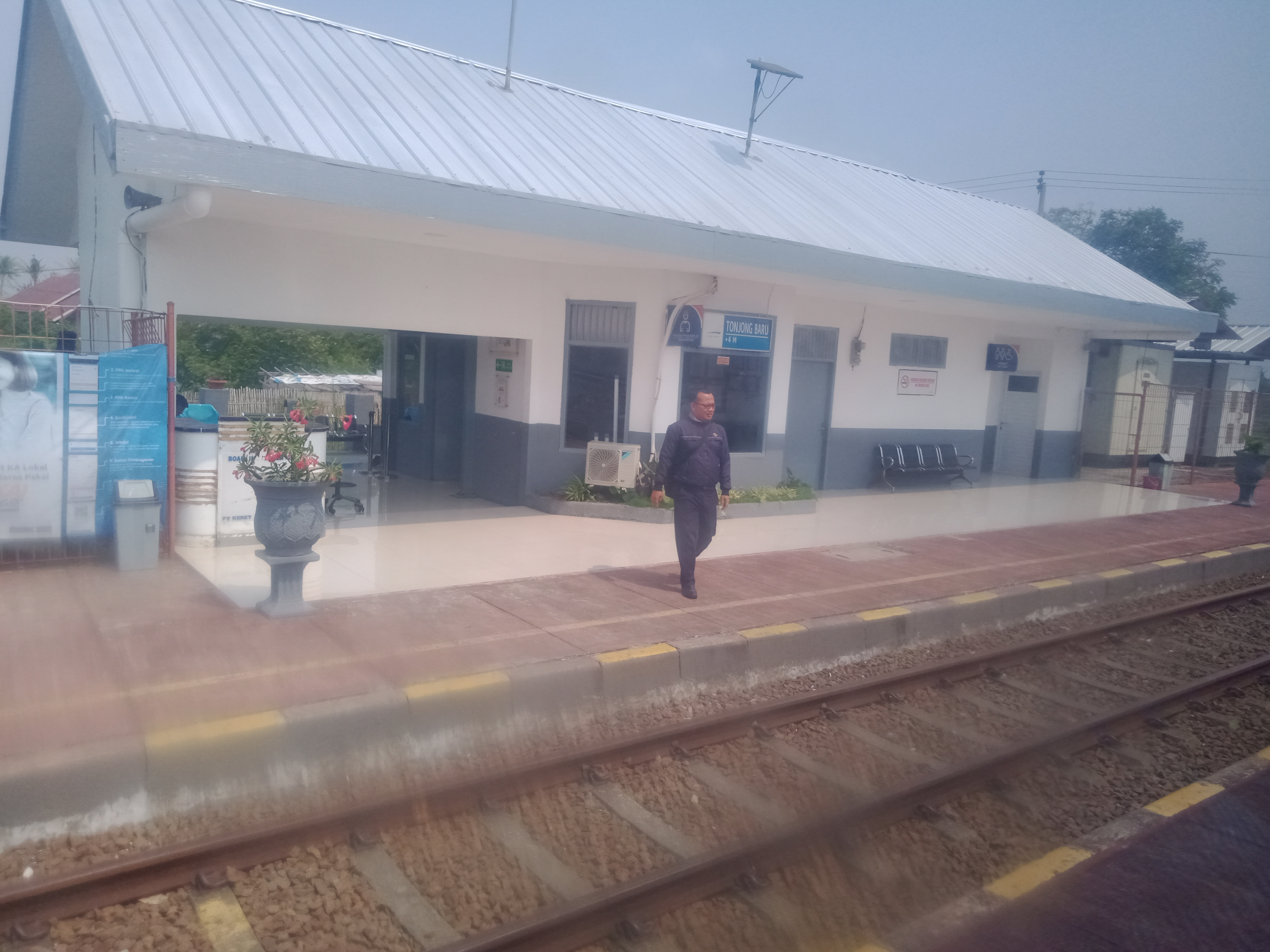 Stasiun Tonjong Baru 2019